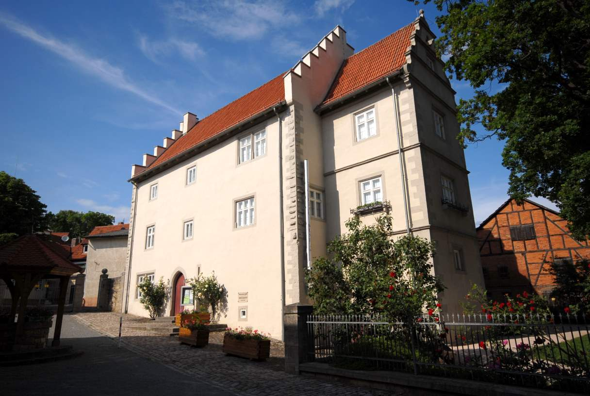 Ostheim v.d.Rhön / Hanitzsches Schloss